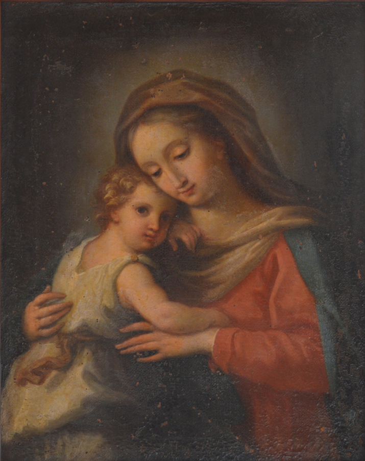 Odoardo Vicinelli, Madonna col Bambino, olio su tela